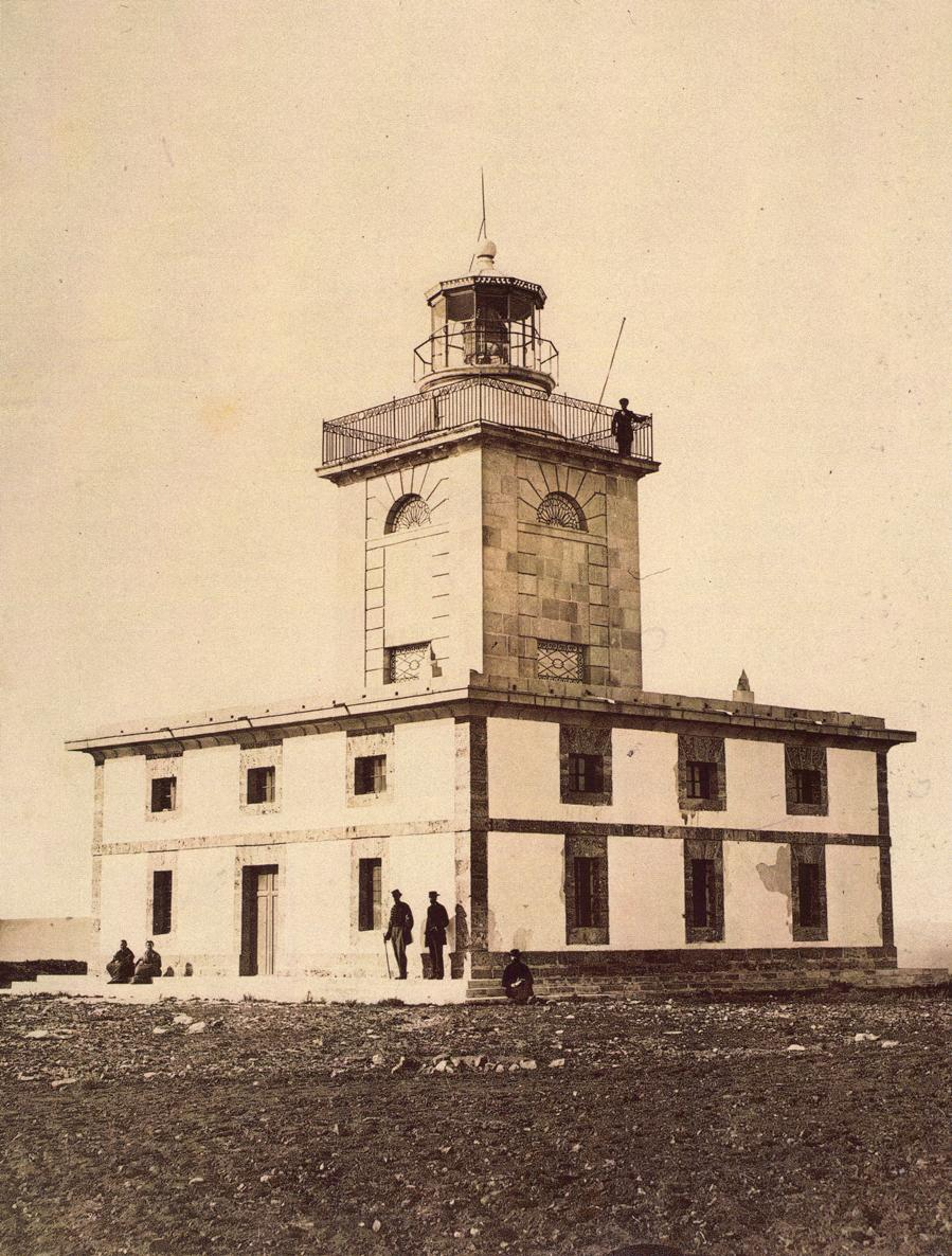 Far de Tabarca, l'Alacantí, foto de Jean laurent (1816-1886) feta en els anys 60 del s.XIX.